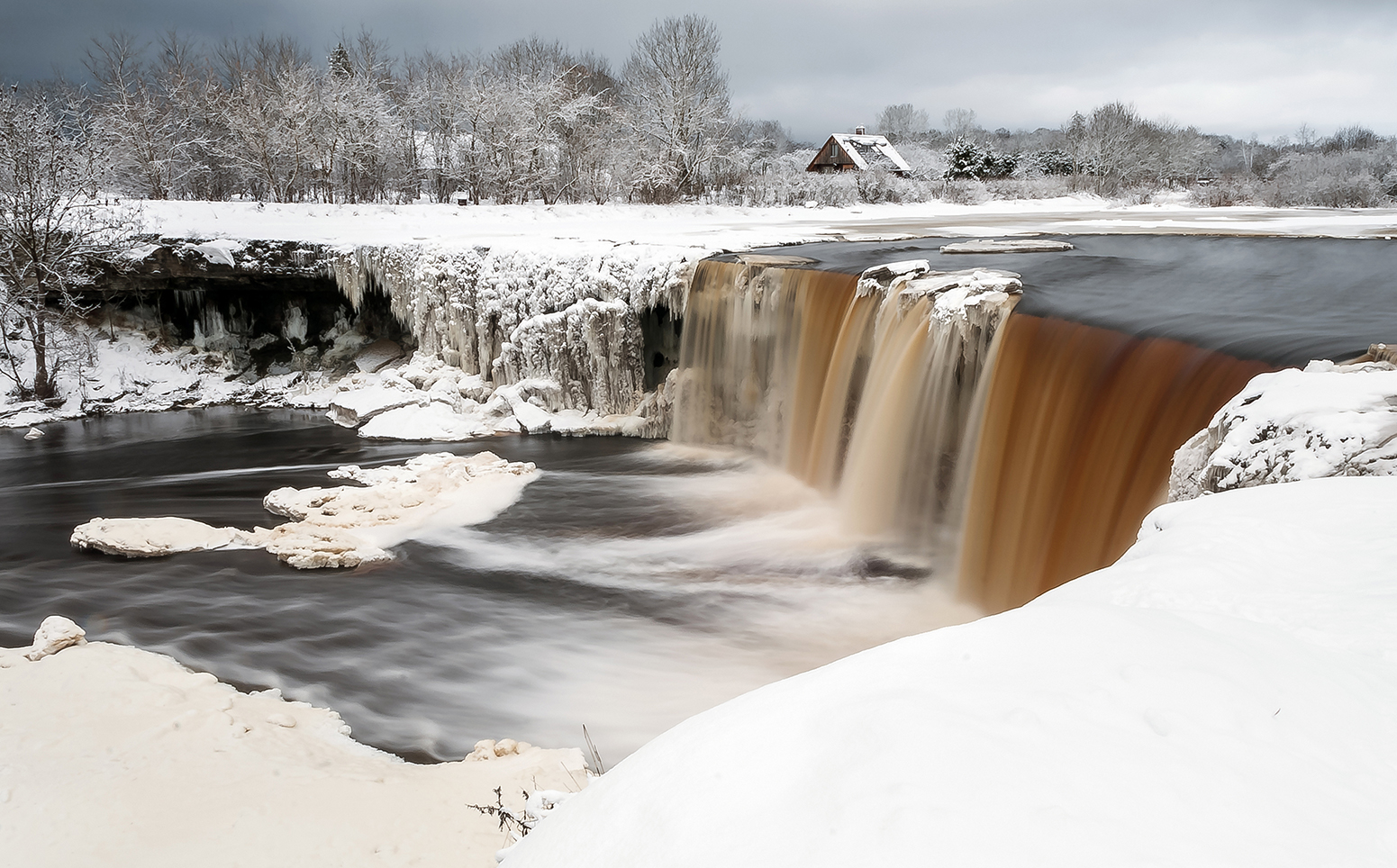 Jägala jõe hoiuala